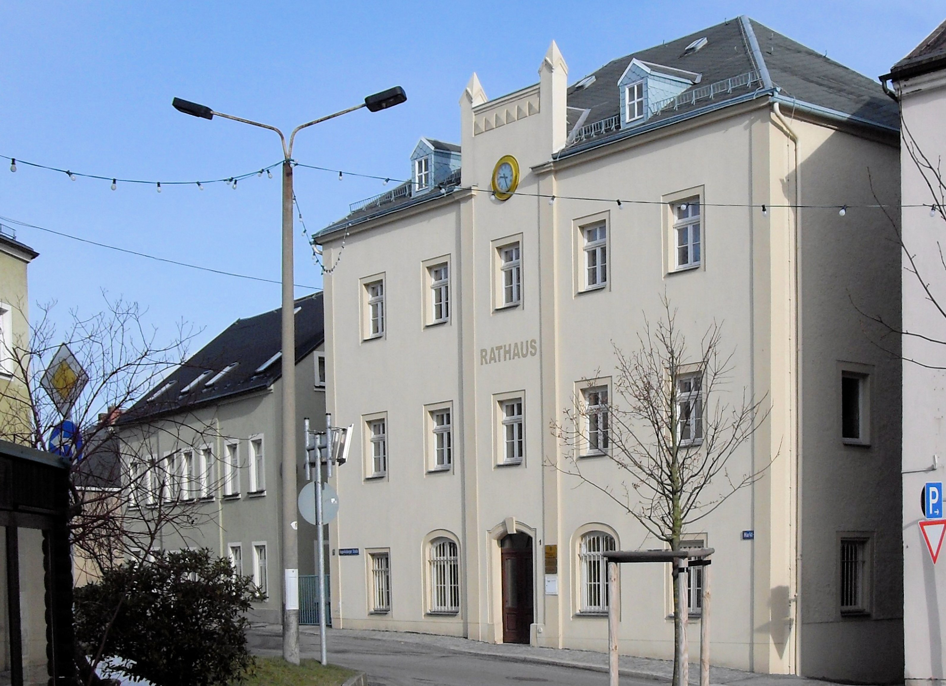 Rathaus Lengefeld, Erzgebirge, Deutschland